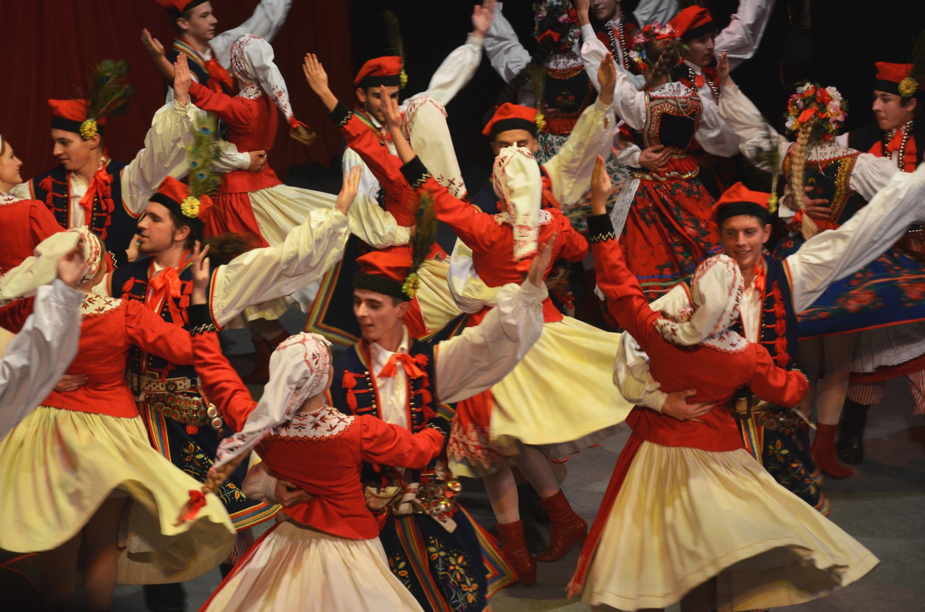 Volkstanz "Krakowiak"